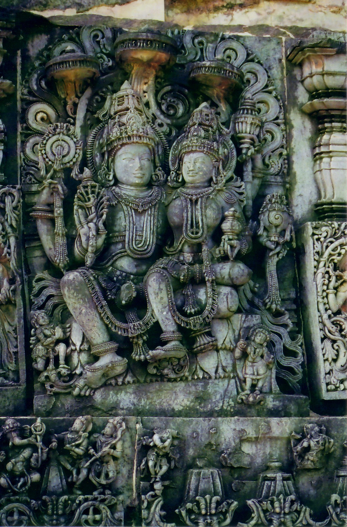 Lakshminarayana sculpture et Hoysaleshwara Temple, Halebidu, Karnataka, India.